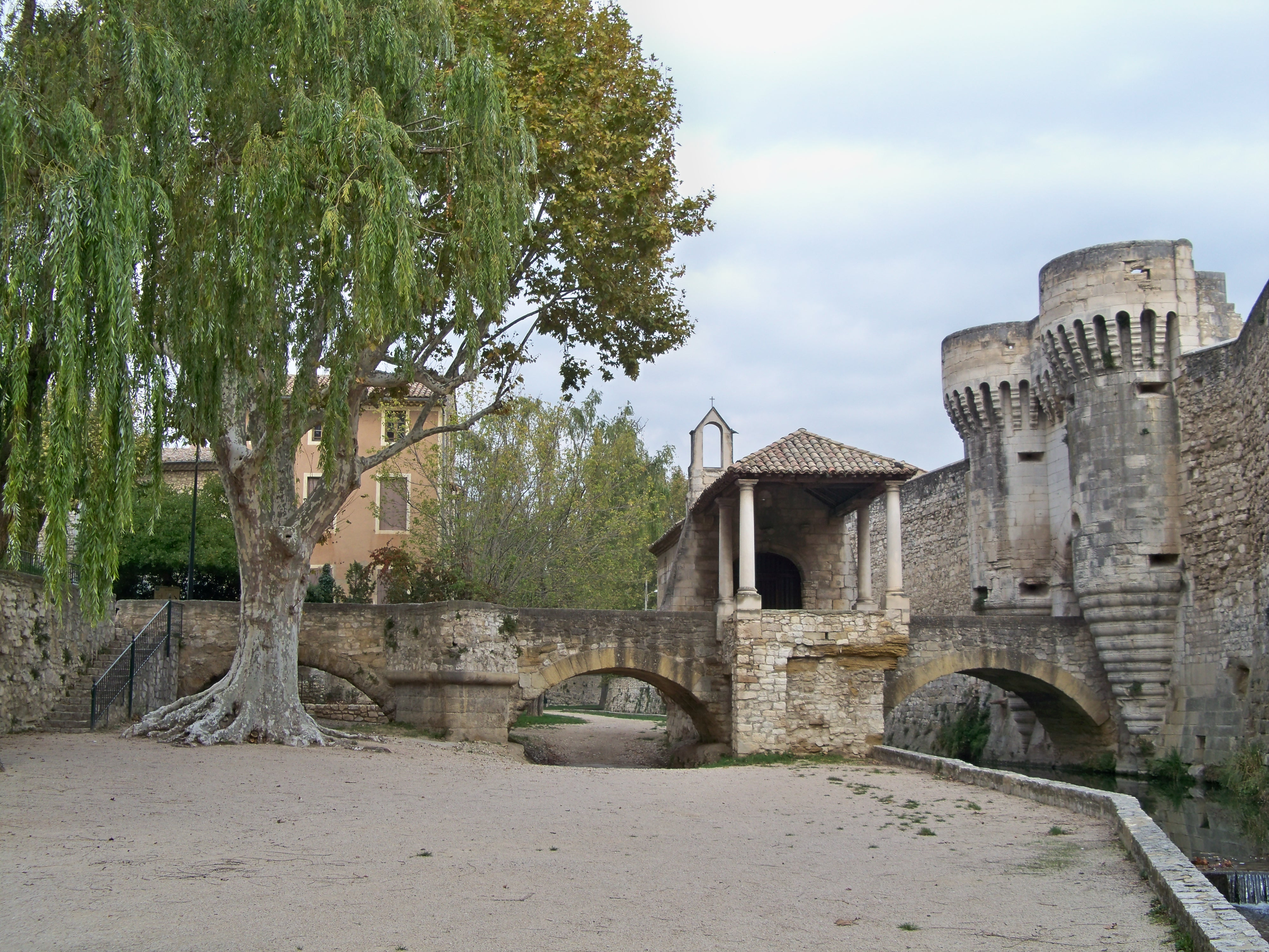 Pont Notre Dame à Pernes les Fontaines, Vaucluse, France